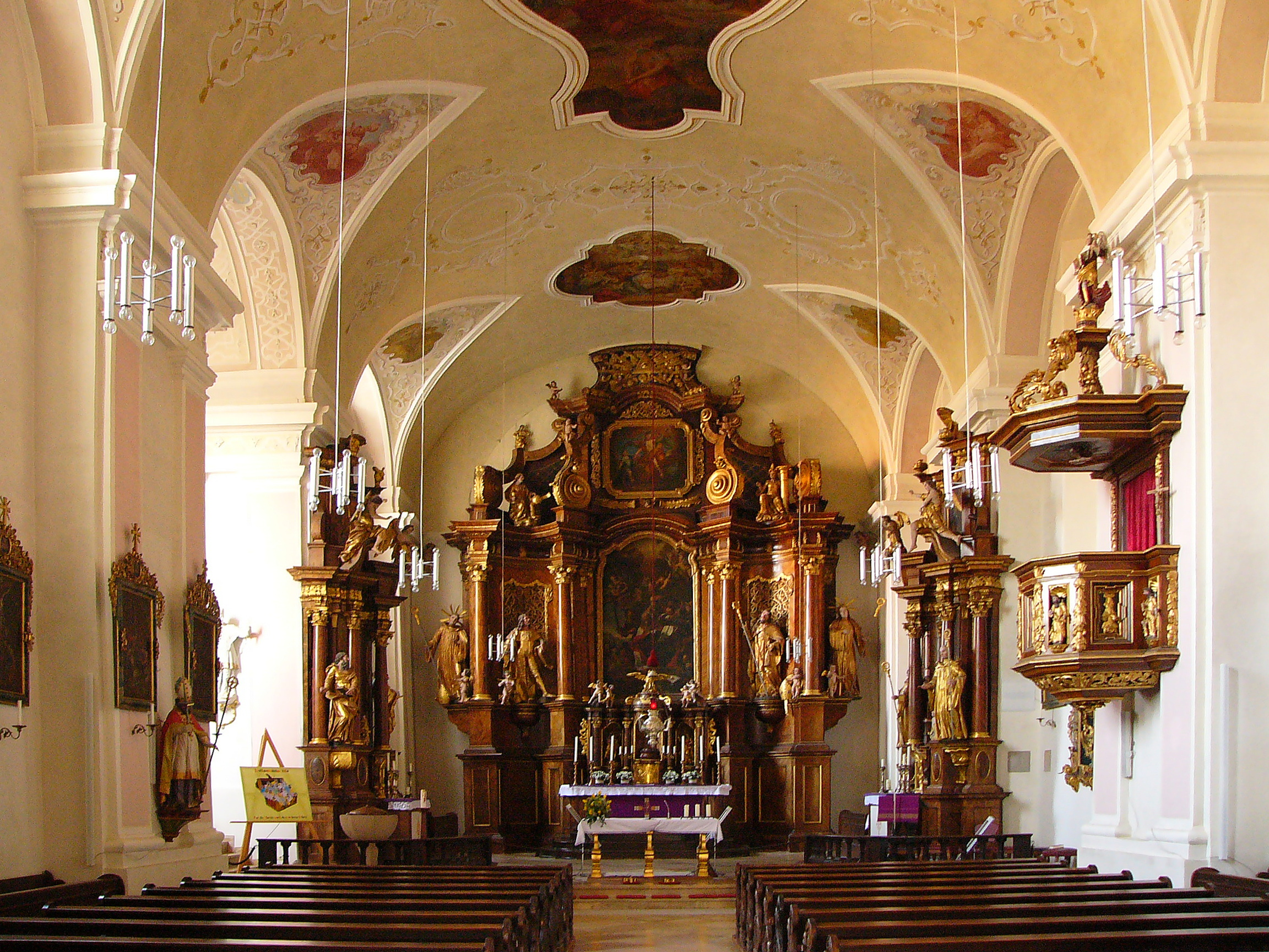 Katholische Pfarrkirche St. Bonifaz; Wunibald und Walburg, ehemalige Benediktinerklosterkirche, barocke Saalkirche mit gerade geschlossenem Chor, Westturm und Kapellenanbau nach Norden, Kirchenraum massiv verputzt mit Walmdach, Turm Sandsteinquader mit Zwiebelhaube, 1692-1707 nach Plänen von Wolfgang Dientzenhofer; mit Ausstattung; an der Südseite, Kreuzgang und Sakristei, zweigeschossiger Pultdachanbau, massiv verputzt; von den ehemaligen Klostergebäuden der Westflügel, dreigeschossiger Sandsteinquaderbau mit abgewalmtem Satteldach, Monumetalpilastergliederung, 1725/27 wohl nach Plänen von Johann Dientzenhofer; zur ehemaligen Klosterökonomie siehe: ehemalige Wirtschaftsgebäude des Klosters, ehemalige Klostermühle und ehemalige Klosterbrauerei.This is a photograph of an architectural monument.